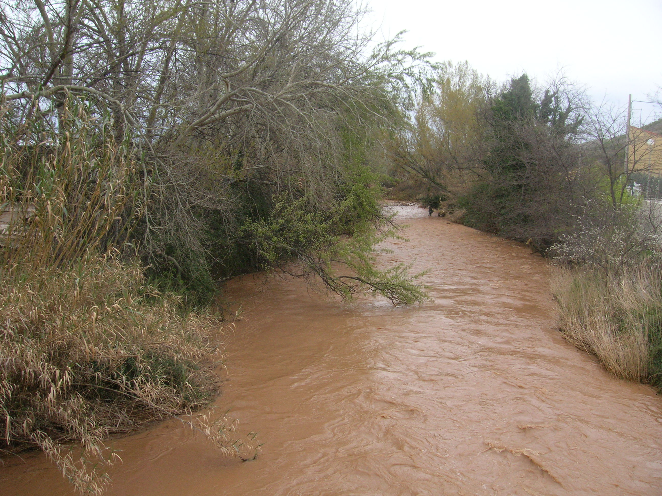 En ocasiones las intensas lluvias de carácter torrencial generan importantes subidas del nivel de las aguas lo que ocasiona desbordamientos